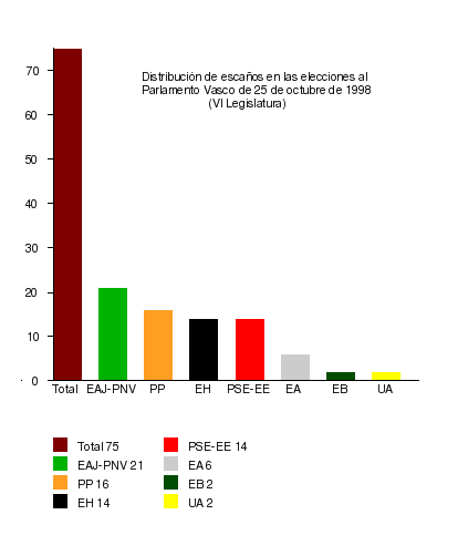 Resultados de las elecciones al Parlamento Vasco (España) de 1998. A partir de un